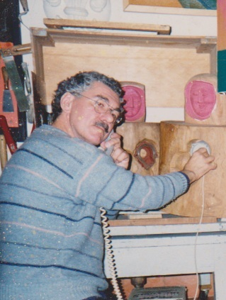 Foto de Alberto Cicchetti, 1985